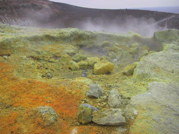 Schwefelfumarole auf Vulcano